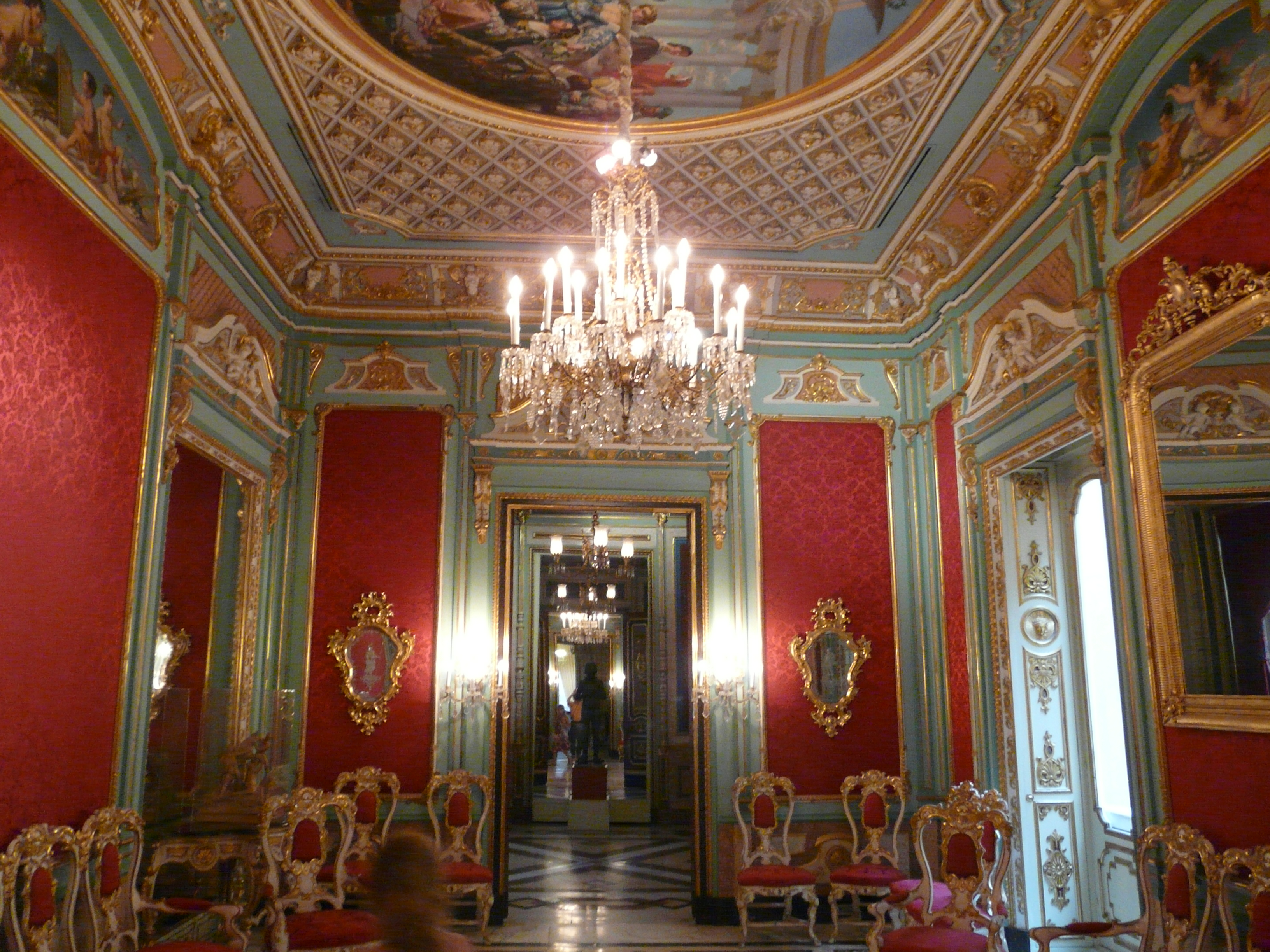 Palau del Marqués de Dosaigües (València) Object location39° 28′ 21.52″ N, 0° 22′ 29.32″ W